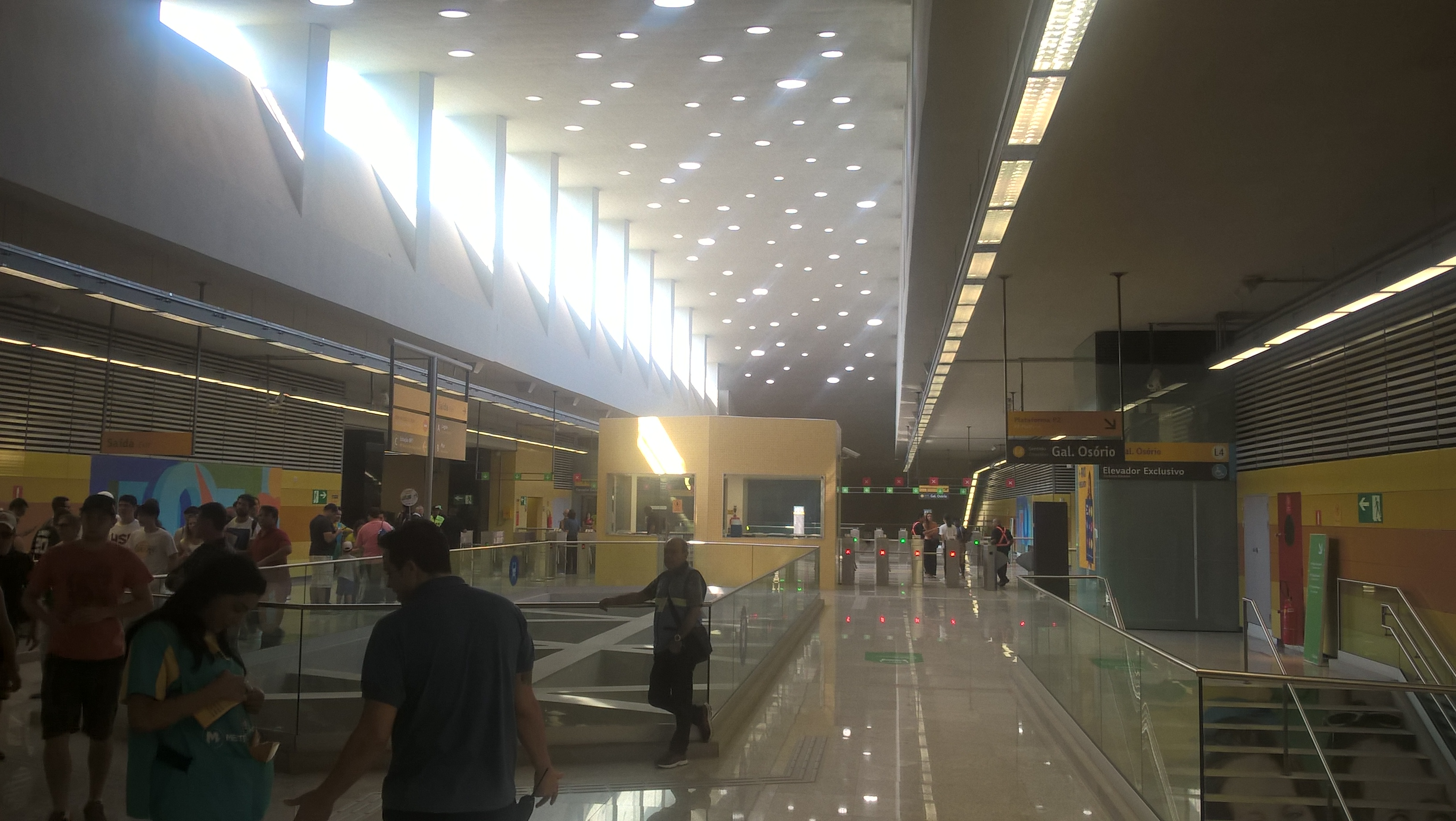 Salão principal da Estação Jardim Oceânico do Metrô - Linha 4